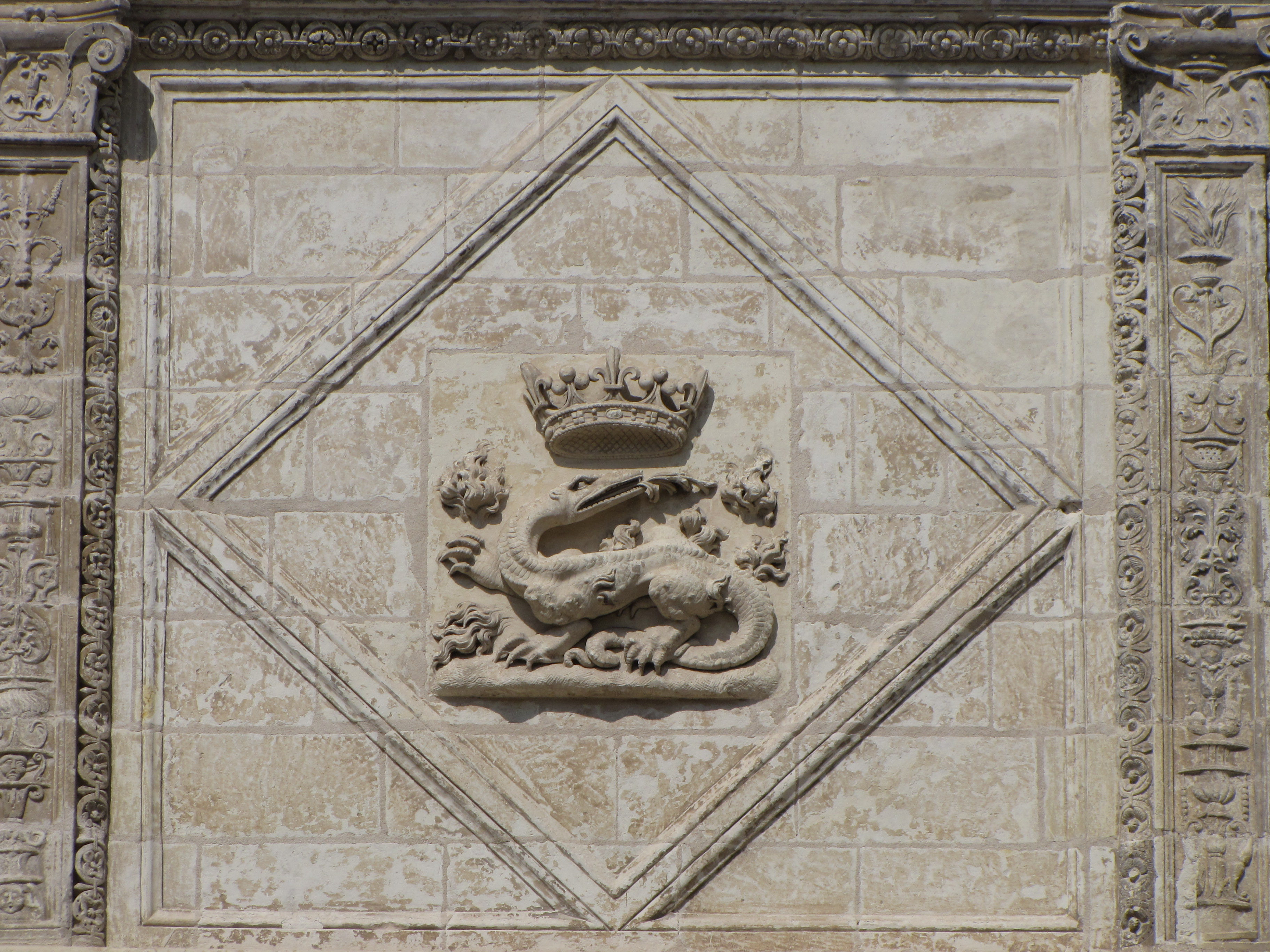 Schloss Blois, Salamander-Relief an der Fassade des Flügels Franz' I.